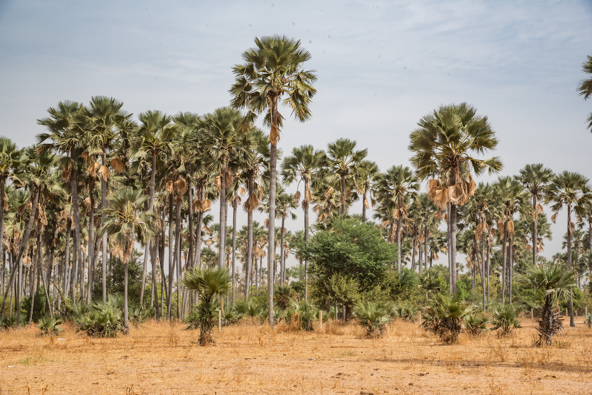 Située sur la communauté rurale de Fimela dans le département de Fatick, la forêt est protégée depuis le 1er janvier 1936. Elle a le statut de réserve de biosphère depuis 1979.